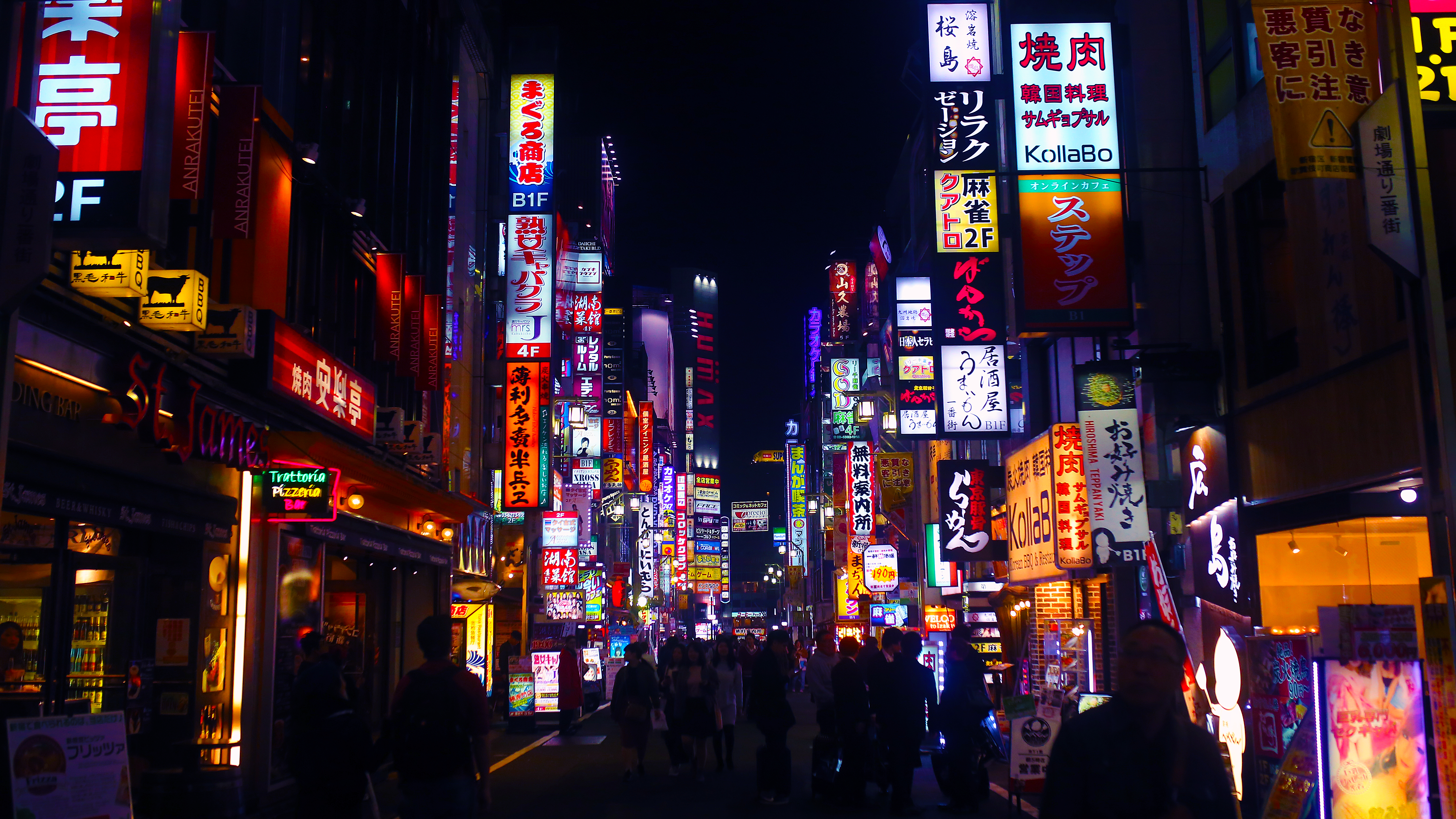 花花綠綠的招牌，走過新宿歌舞伎町一路上都是這樣繽紛的色彩！ Canon 6D Sigma 35mm F1.4 DG HSM Art IMG_9430_16x9